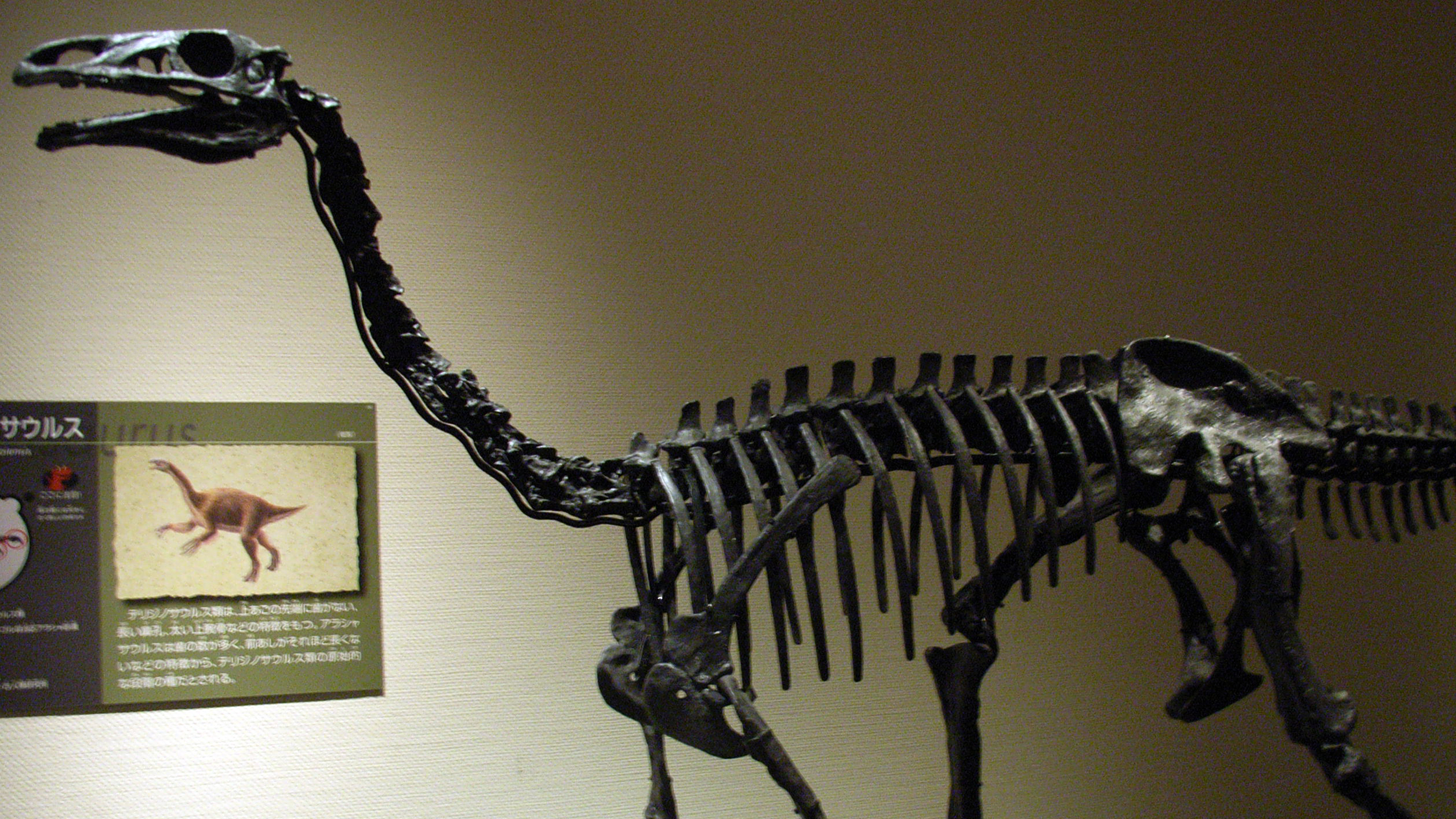 北九州市立 自然史・歴史博物館 いのちのたび博物館